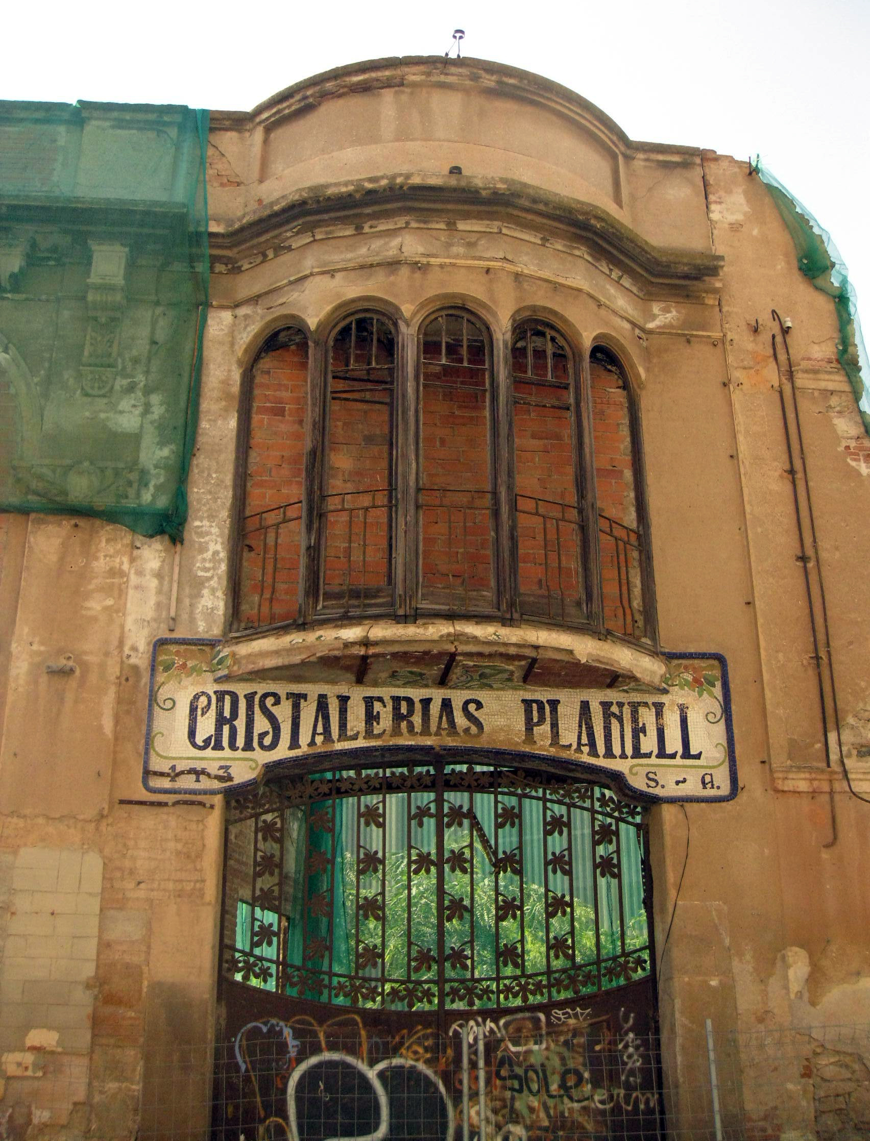 Cristalleria Planell (Barcelona) Object location41° 23′ 14.64″ N, 2° 07′ 55.37″ E